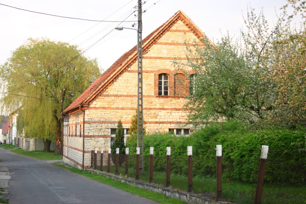 Strzeleczki Klein Strehlitz Object location50° 27′ 33″ N, 17° 51′ 09″ E